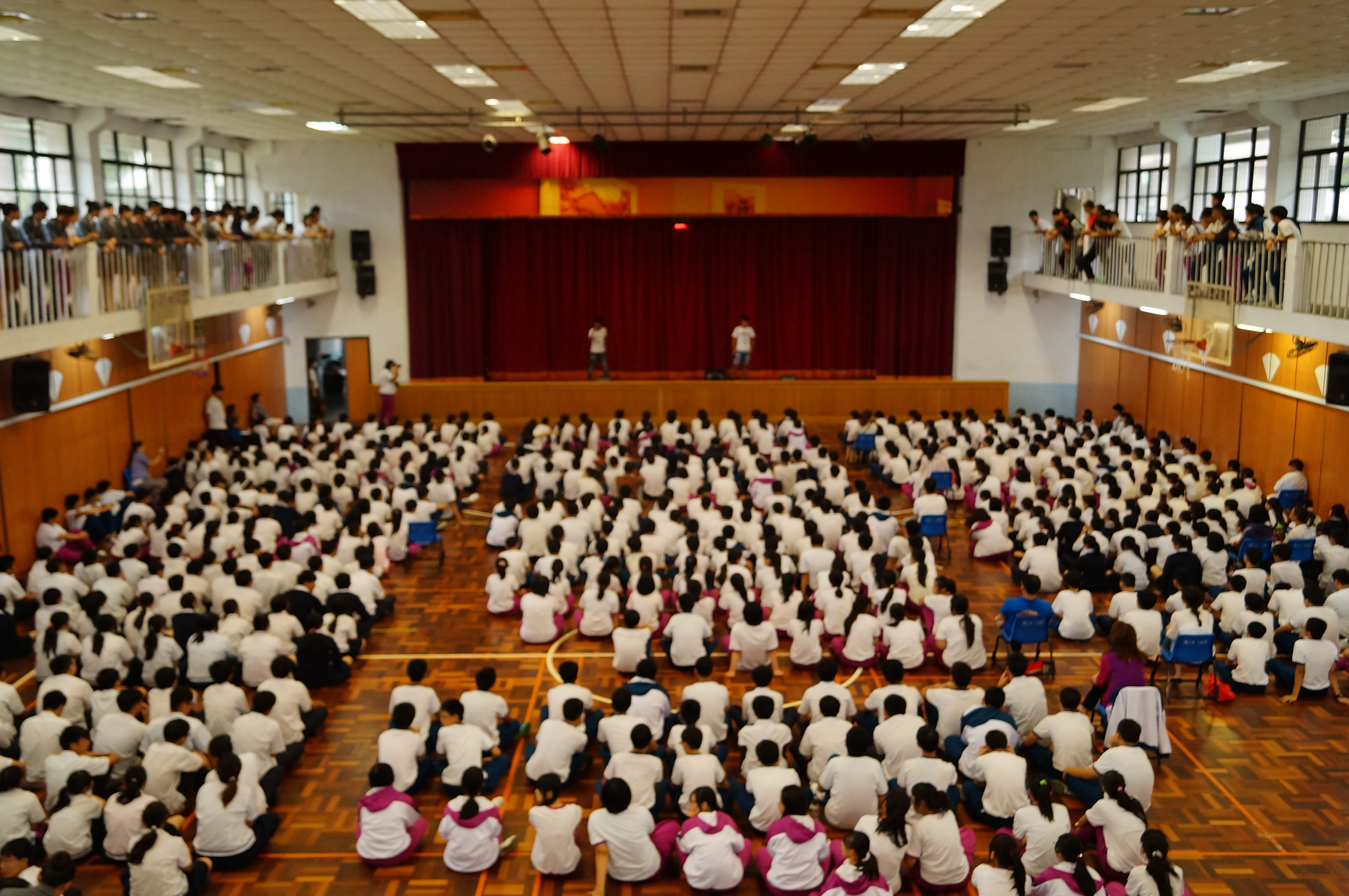 中文（台灣）: 滬江高中 中正堂 多功能體育館內部，學生正在參加社團成果發表。